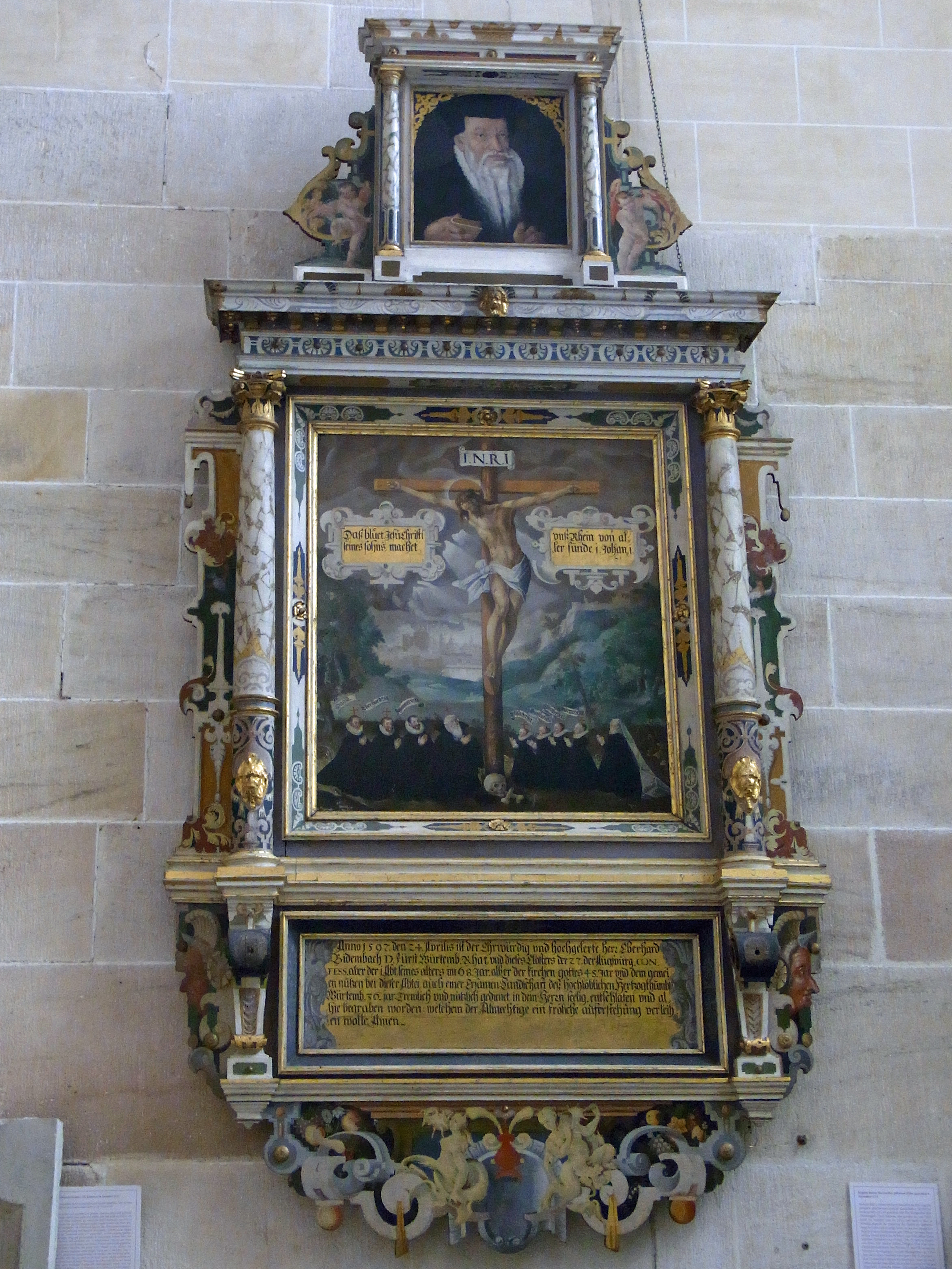 Kloster Bebenhausen: Klosterkirche